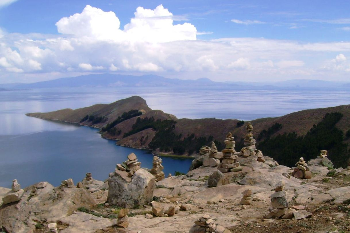 Isla del Sol.